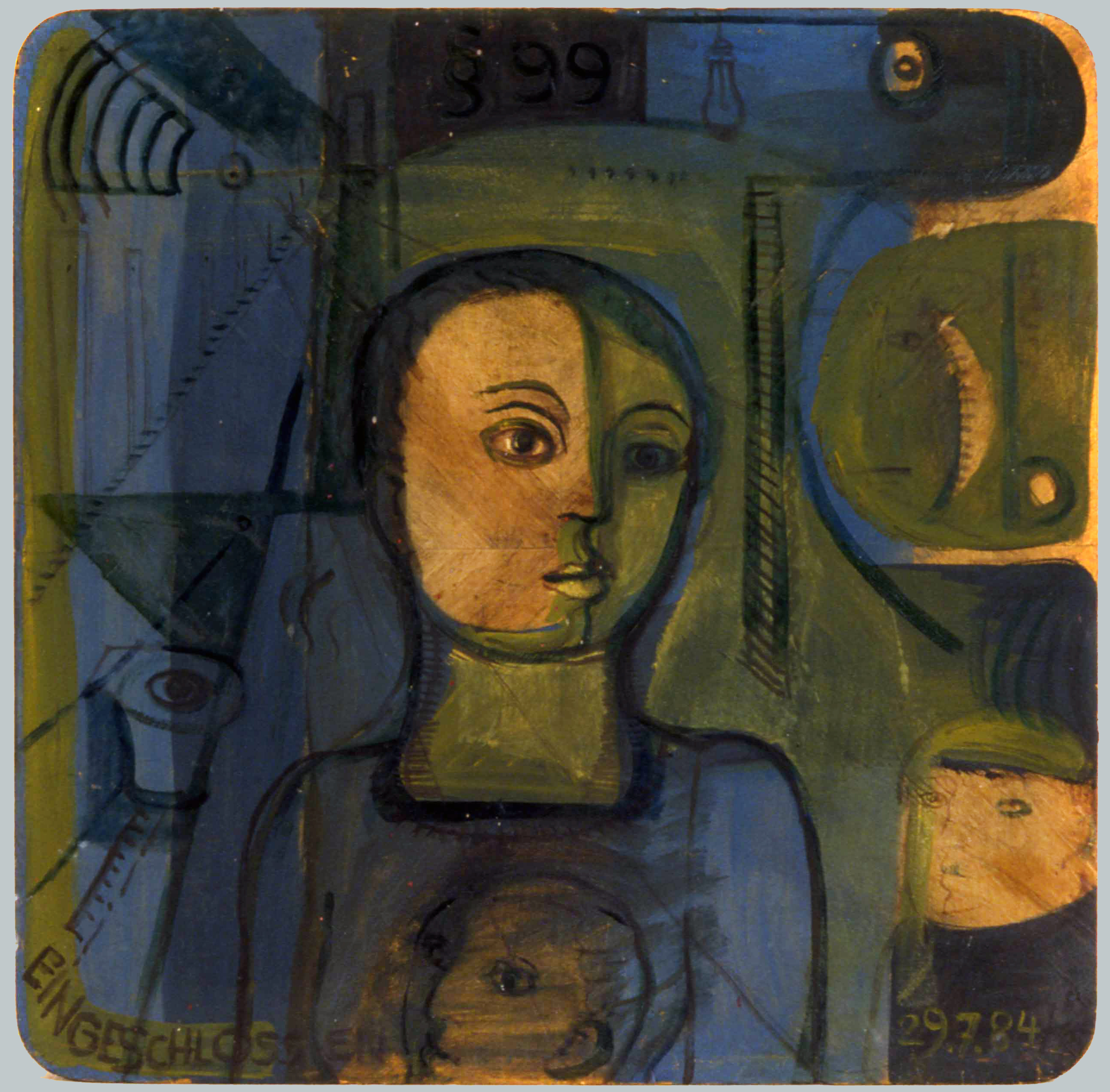 "Bohley Eingeschlossene", ein Werk von Annemirl Bauer (1939-1989) aus dem Jahr 1984, in dem sie wegen ihres Eintretens für Reisefreiheit und für die Bürgerrechtlerin Bärbel Bohley aus dem Künstlerverband der DDR ausgeschlossen wurde